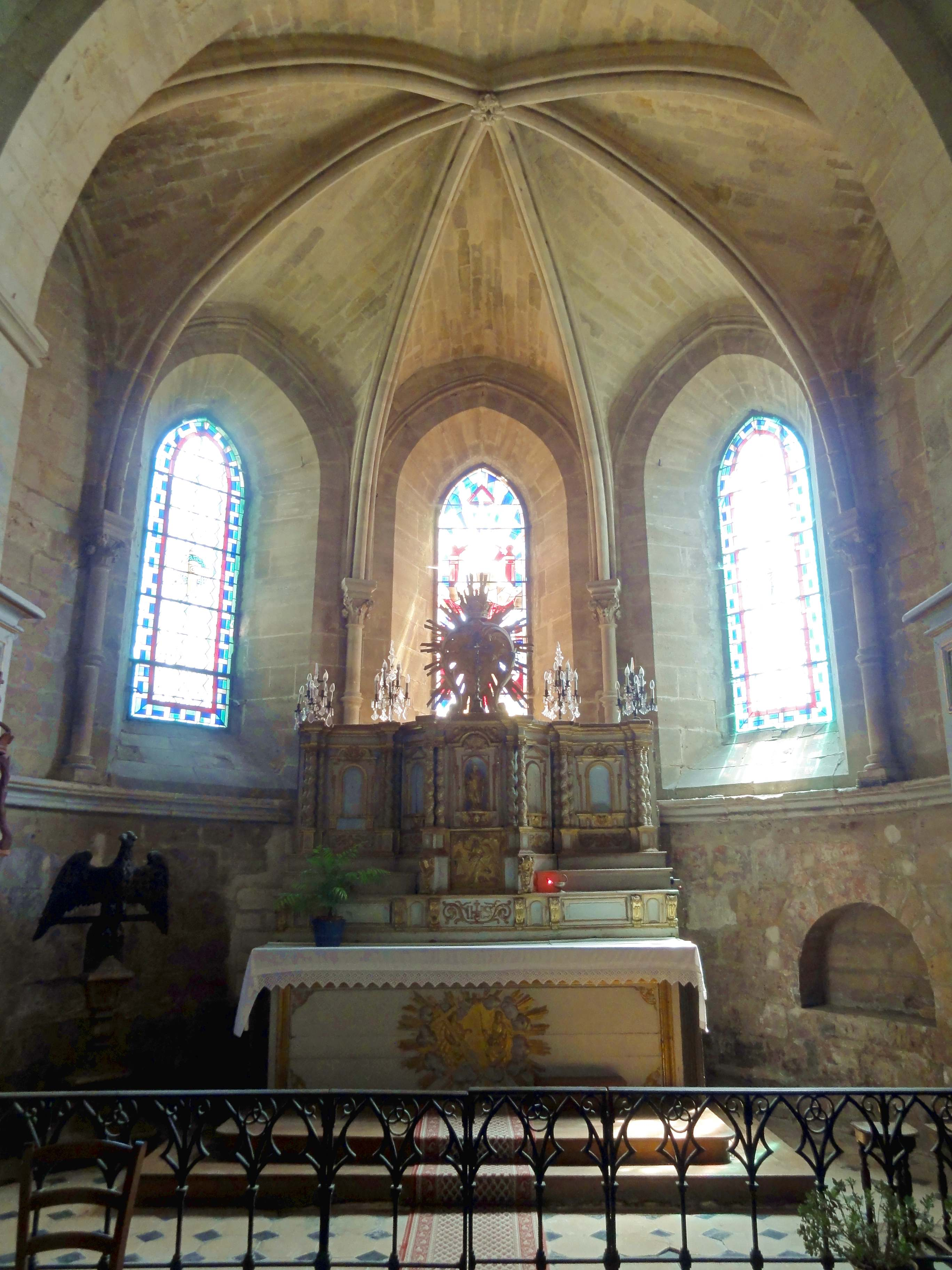 Intérieur de l'église (voir titre).